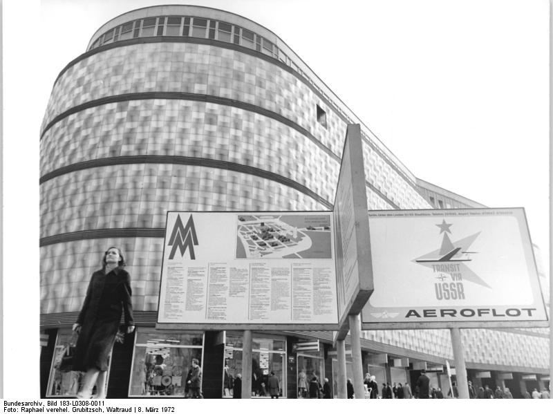 Leipzig, "Konsument"-Warenhaus ADN-ZB Raphael 8.3.1972 Leipzig: Am Vorabend der Leipziger Frühjahrmesse 1972 sind die Straßen der Messestadt zum Empfang der Gäste aus allen Teilen der Erde vorbereitet. Im Hintergrund das "konsument"-Warenhaus am Leipziger Brühl. 9000 Aussteller aus etwa 60 Ländern beteiligten sich 1972 an der Leipziger Frühjahrsmesse. Besucher werden aus mehr als 80 Ländern in der Handelsmetropole erwartet.